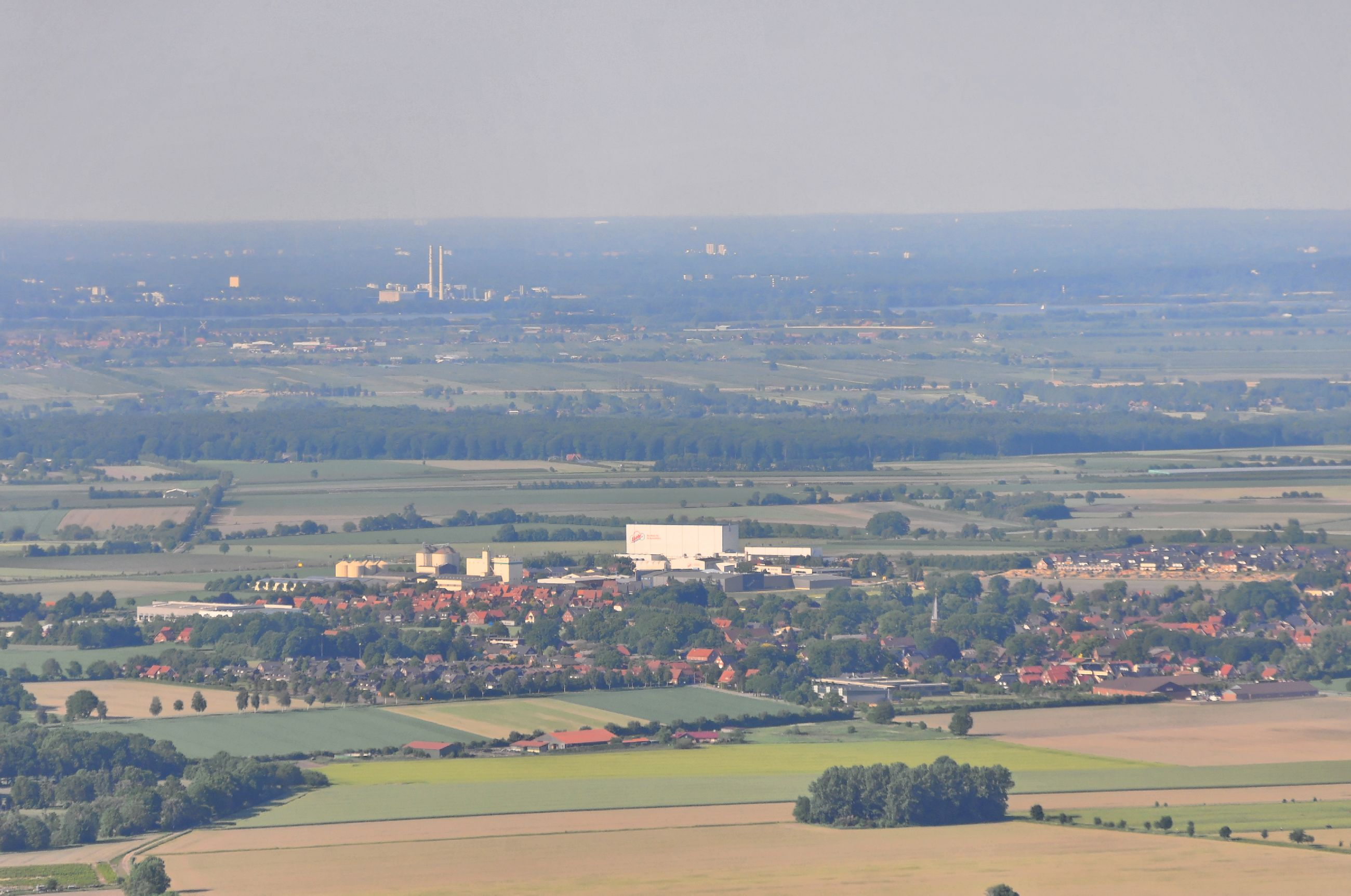 Überführungsflug vom Flugplatz Nordholz-Spieka über Lüneburg, Potsdam zum Flugplatz Schwarzheide-Schipkau